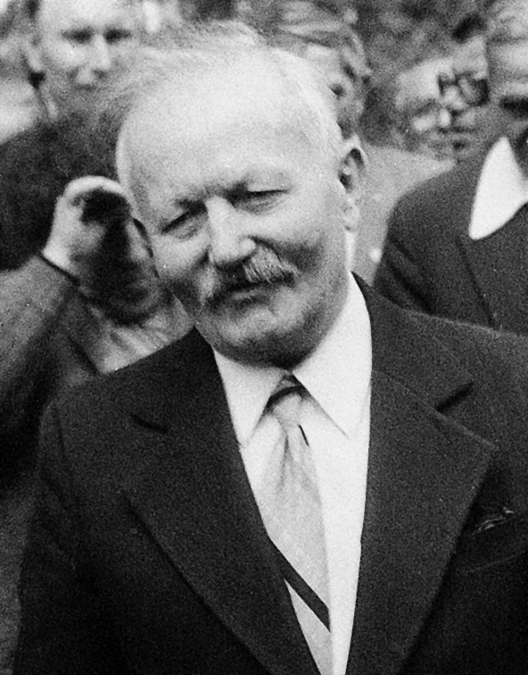 ppłk Jan Szatowski 1907-1988